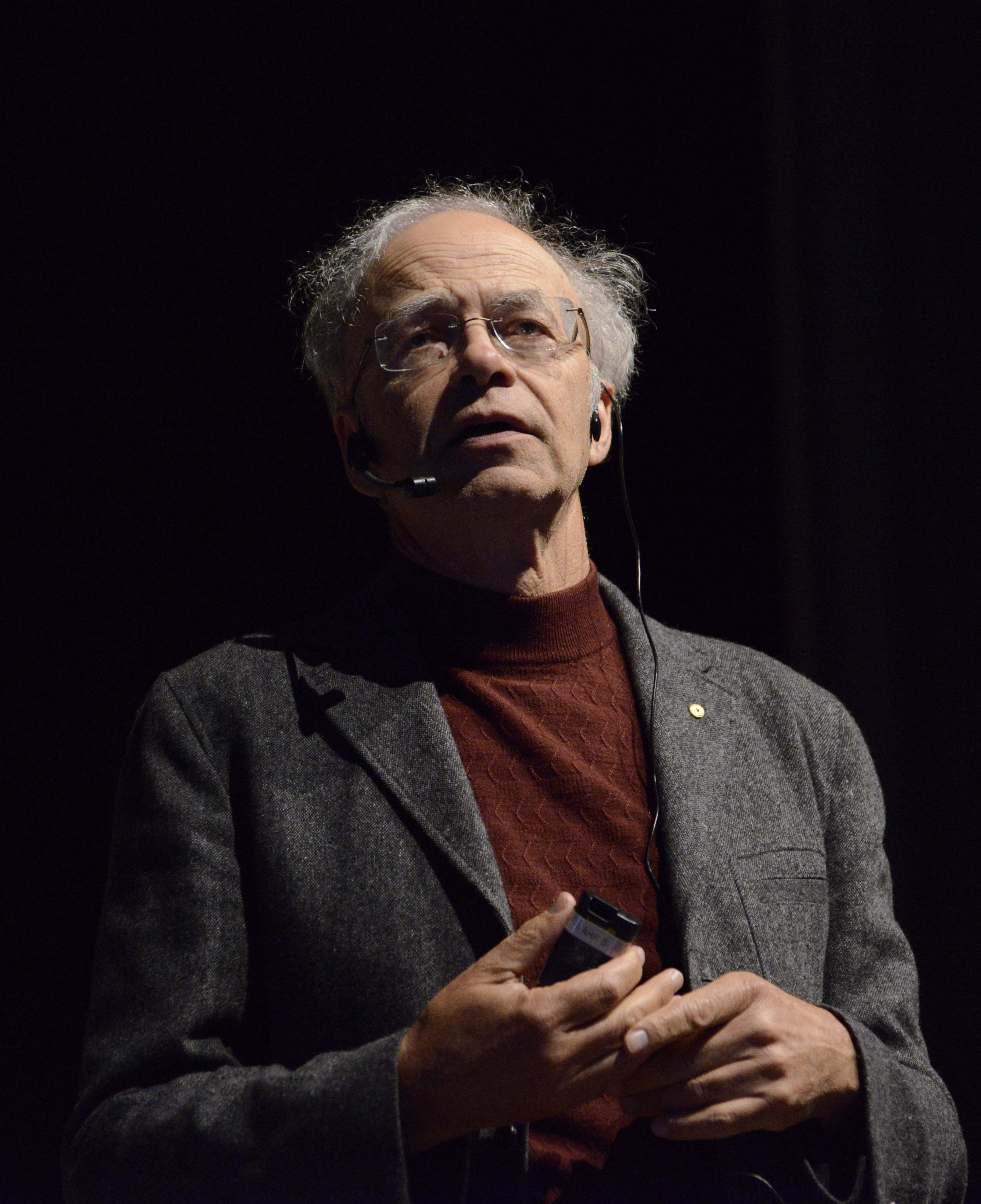 Peter Singer no Fronteiras do Pensamento Porto Alegre